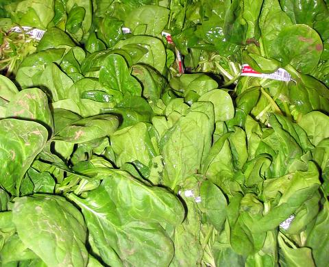 Spinach at Kroger.